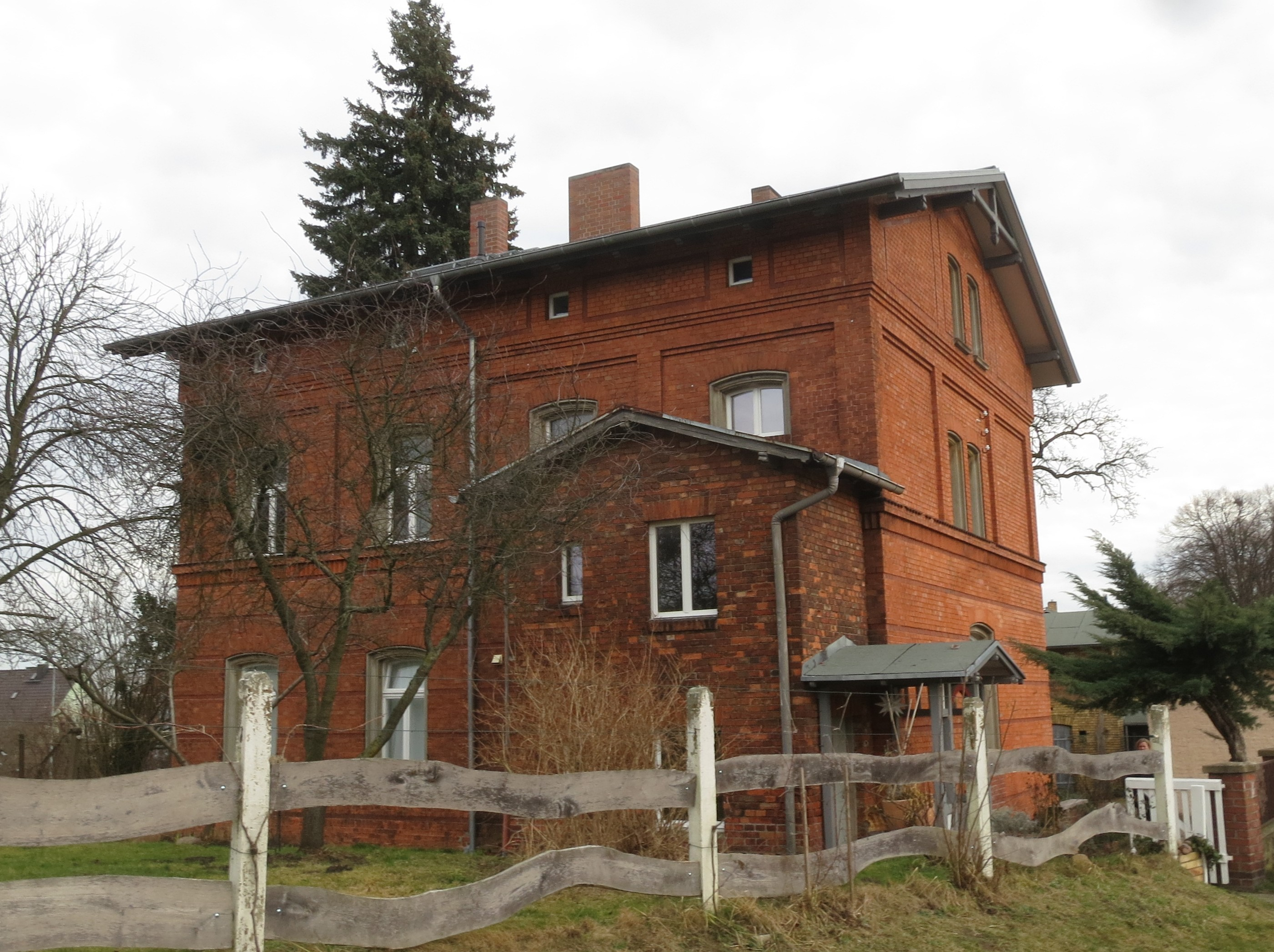 Bahnhof Bad Belzig, denkmalgeschütztes Eisenbahnerwohnhaus Am Bahnhof 1